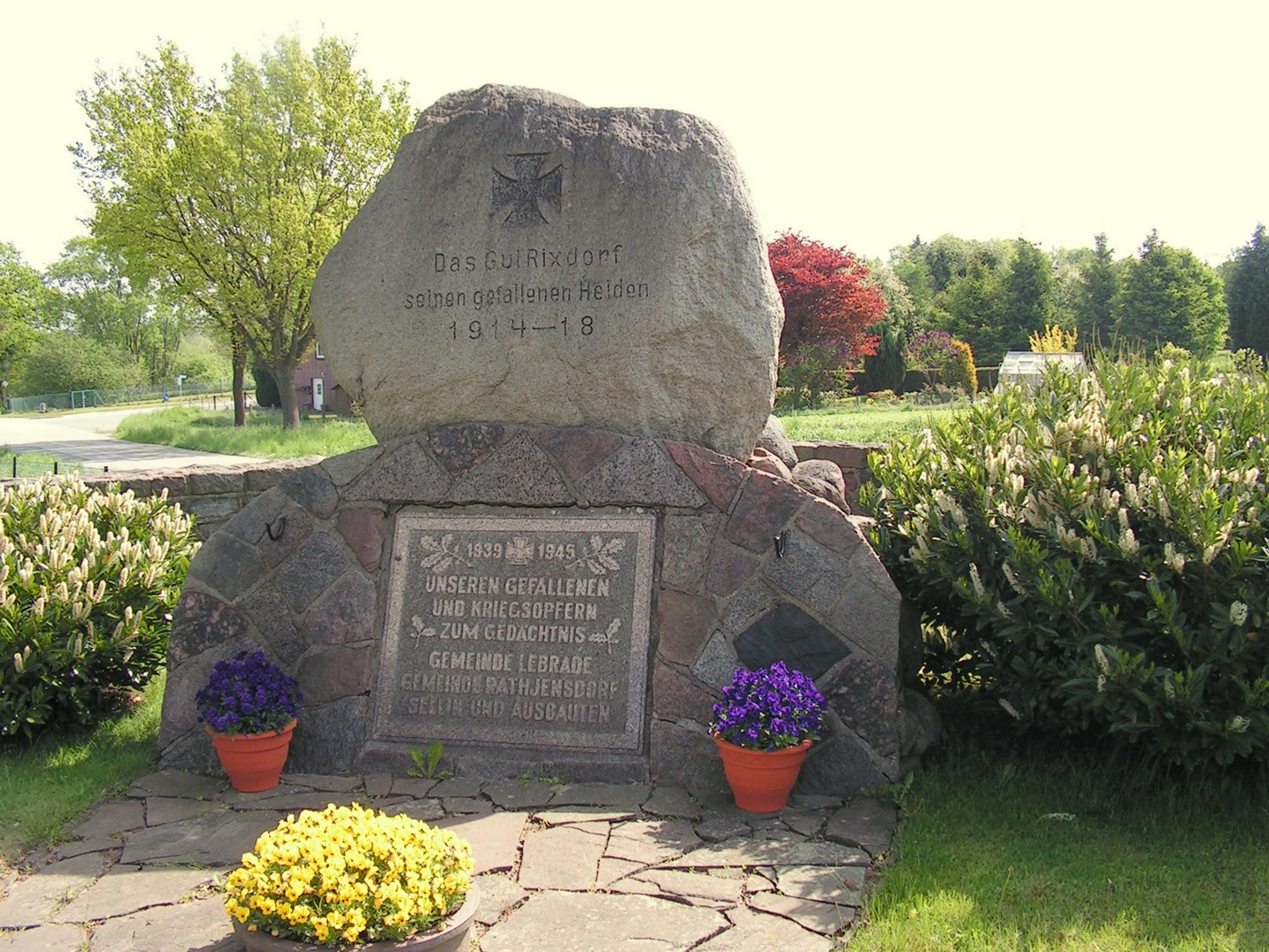 Lebrade/Gedenkstein